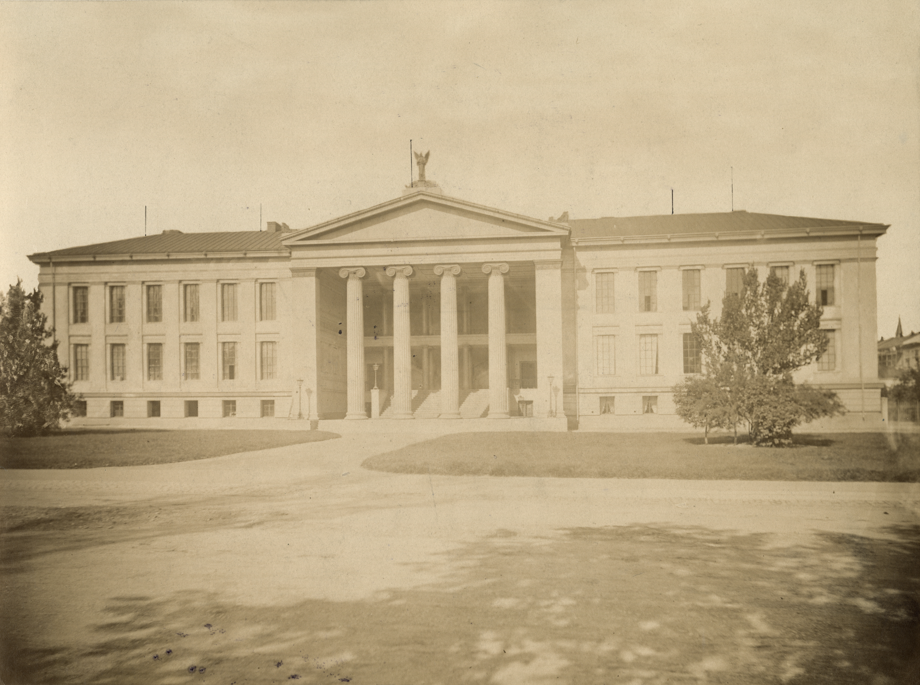 Universitetet i Oslo, Det kgl. Frederiks Universitet i Oslo, Oslo